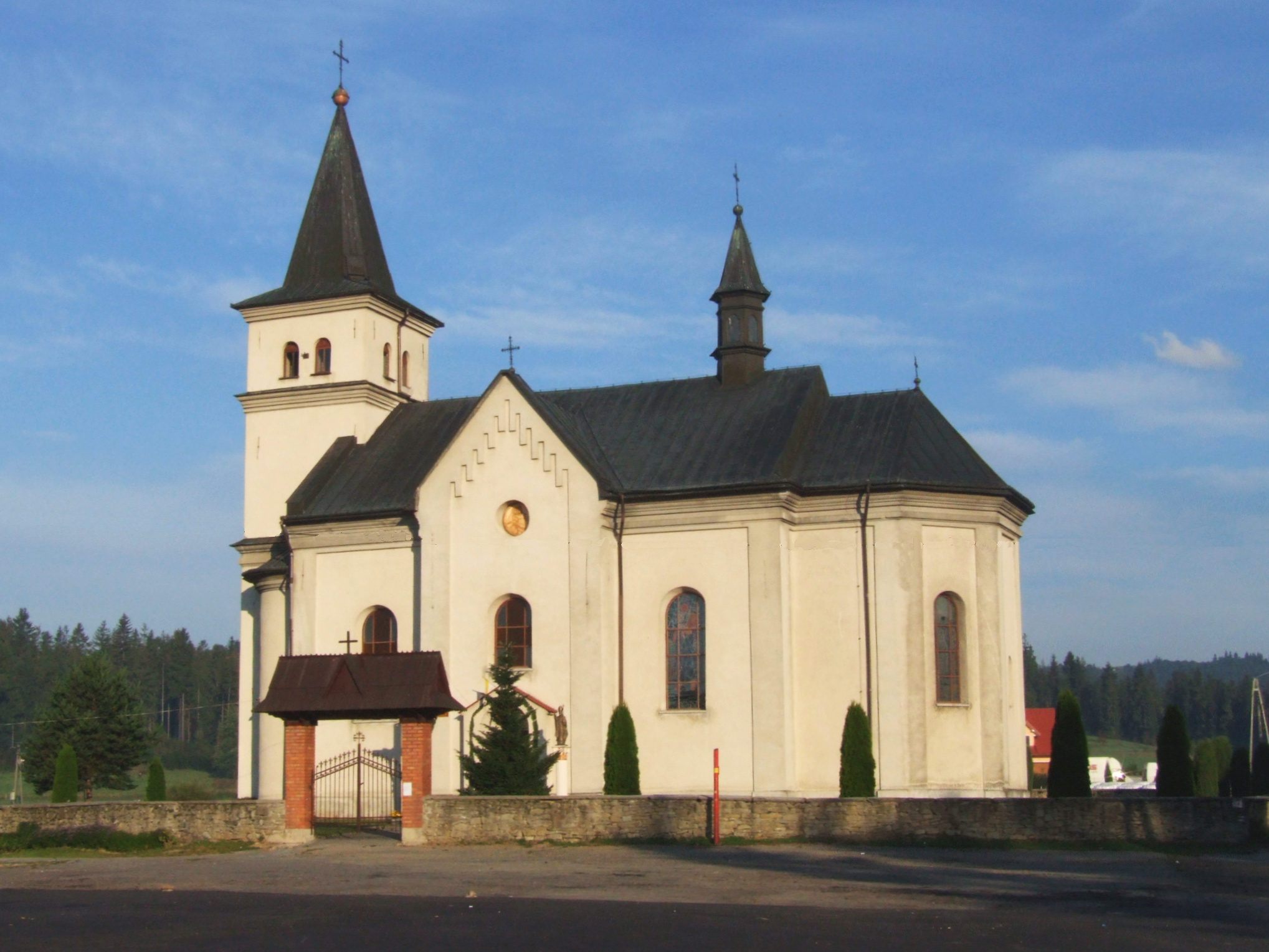 Kościół w Pieniążkowicach